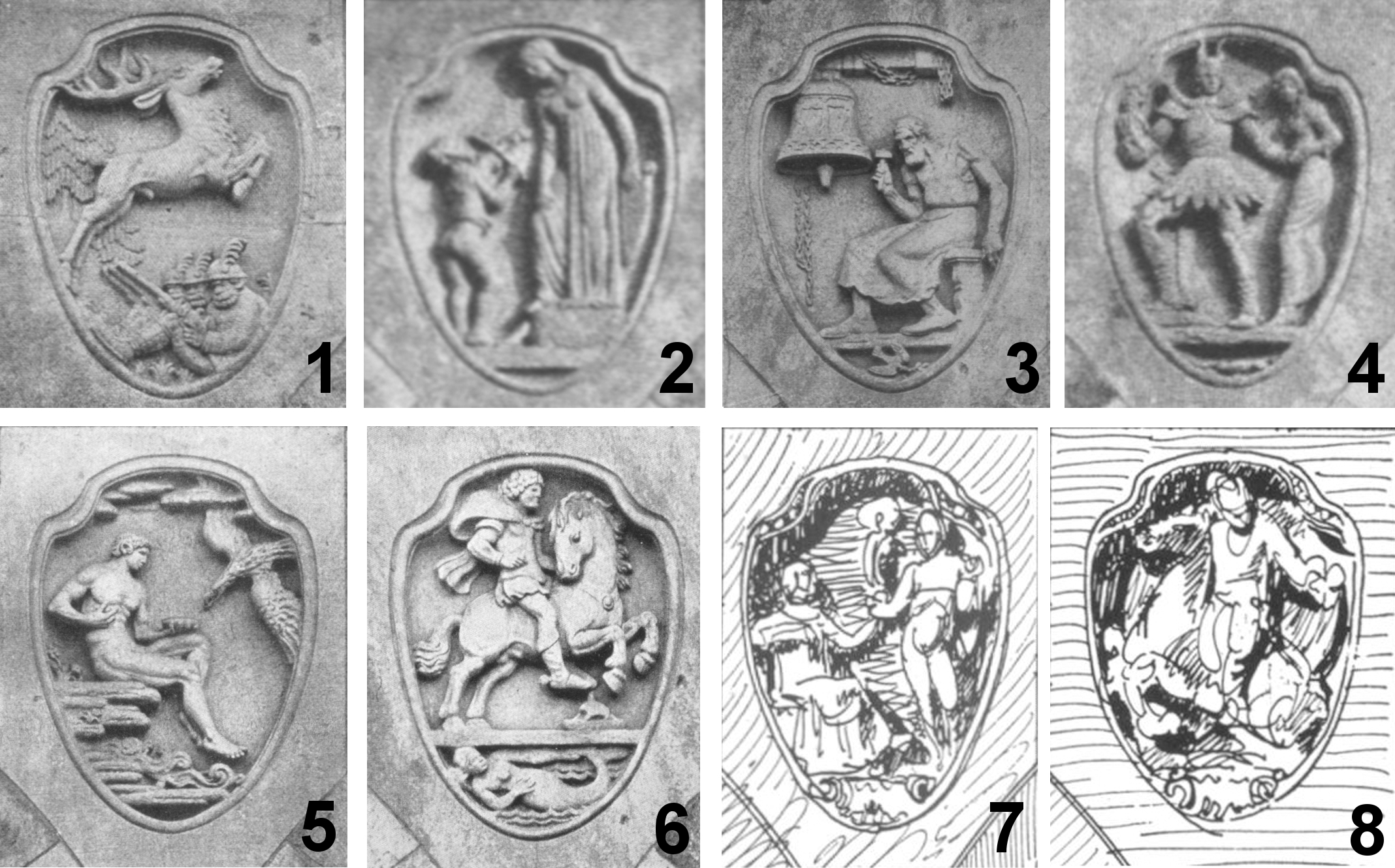 Acht Reliefmedaillons über den sechs Säulen und den zwei Eckpfeilern des Säulengangs des Kunstgebäudes in Stuttgart, 1913. Medaillon 1-6 von Josef Zeitler, Medaillon 7-8 von Jakob Brüllmann (Nummerierung der Medaillons von links nach rechts). Die Medaillons wurden im Zweiten Weltkrieg bis auf Medaillon 6 und 7 zerstört. Medaillon 6 wurde an die linke Seitenfassade versetzt, Medaillon 7 an die Wand des Säulengangs. Die Reliefs stellten Szenen aus den Werken von acht berühmten schwäbischen Dichtern dar. Siehe auch die Einzelbilder: File:Josef Zeitler, 061.jpg, File:Josef Zeitler, 062.jpg, File:Jakob Brüllmann, 006.jpg, File:Josef Zeitler, 064.jpg, File:Jakob Brüllmann, 008.jpg, File:Jakob Brüllmann, 009.jpg, File:Jakob Brüllmann, 001.jpg, File:Jakob Brüllmann, 002.jpg.